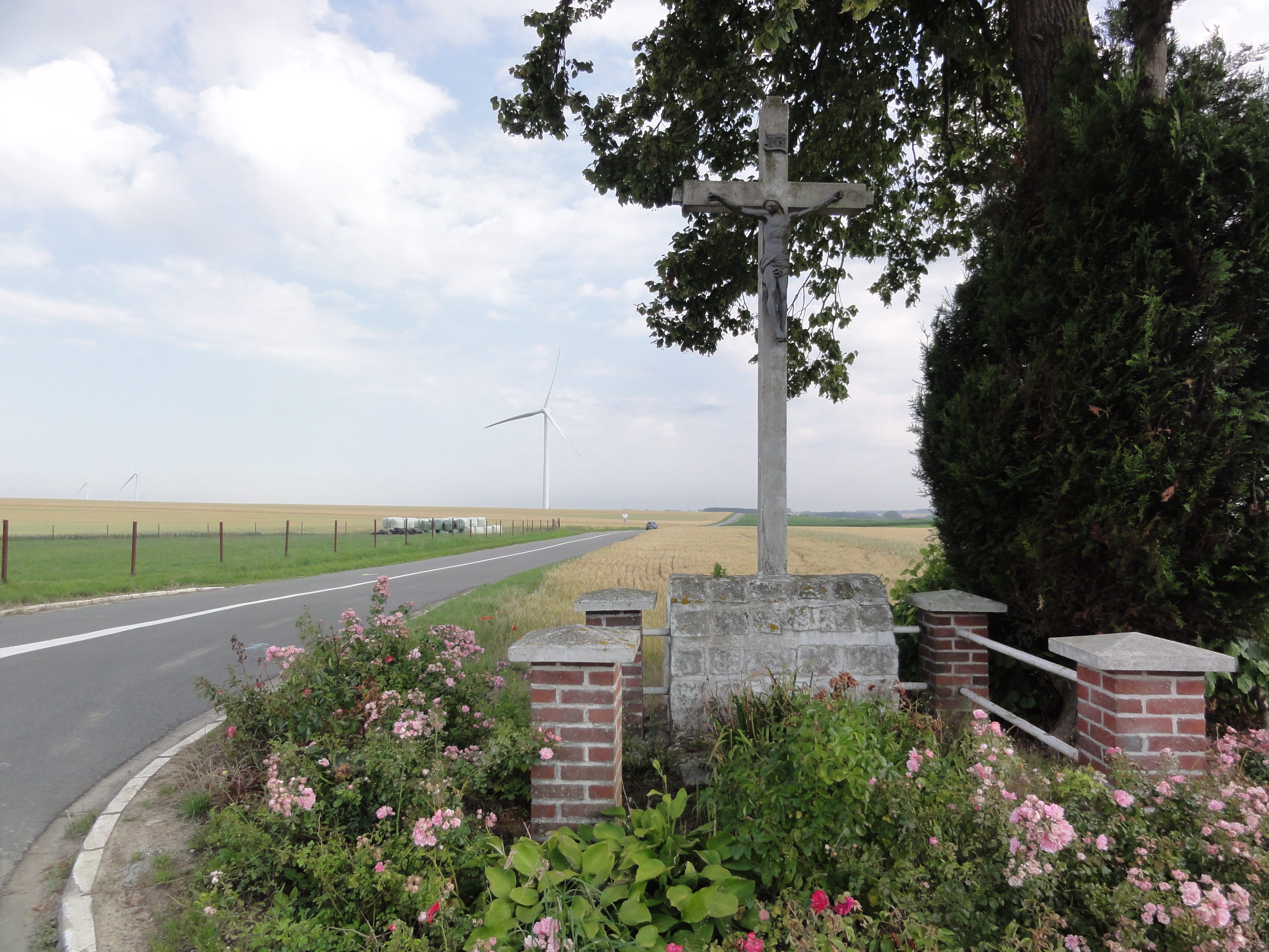 Salesches (Nord, Fr) calvaire D100.